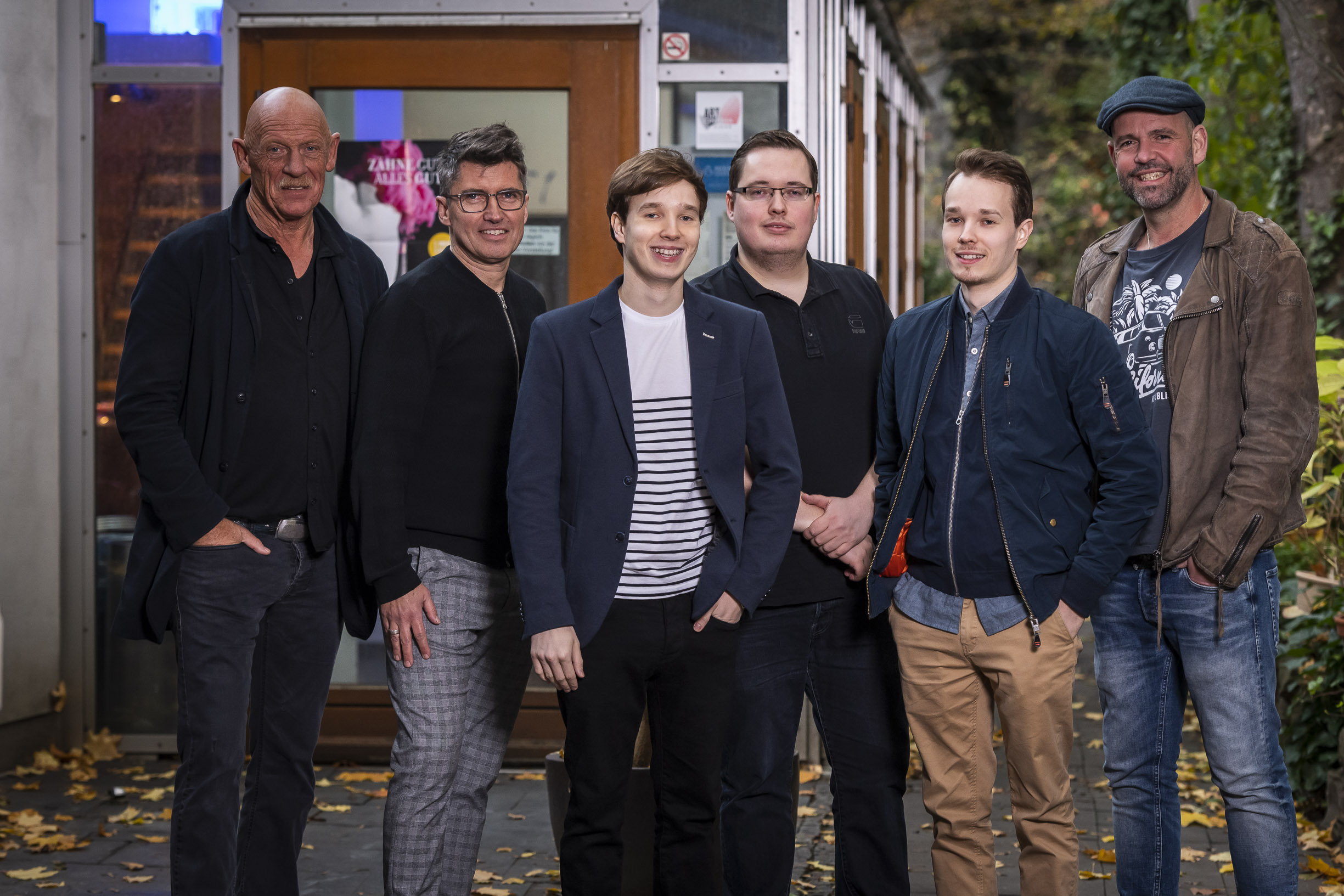 Joe Bausch, Dirk Kropp, Doc Esser und das Team von „Hamlet - Das dentale Drama“ beim Kurzfilmwettbewerb „Zähne gut - alles gut“